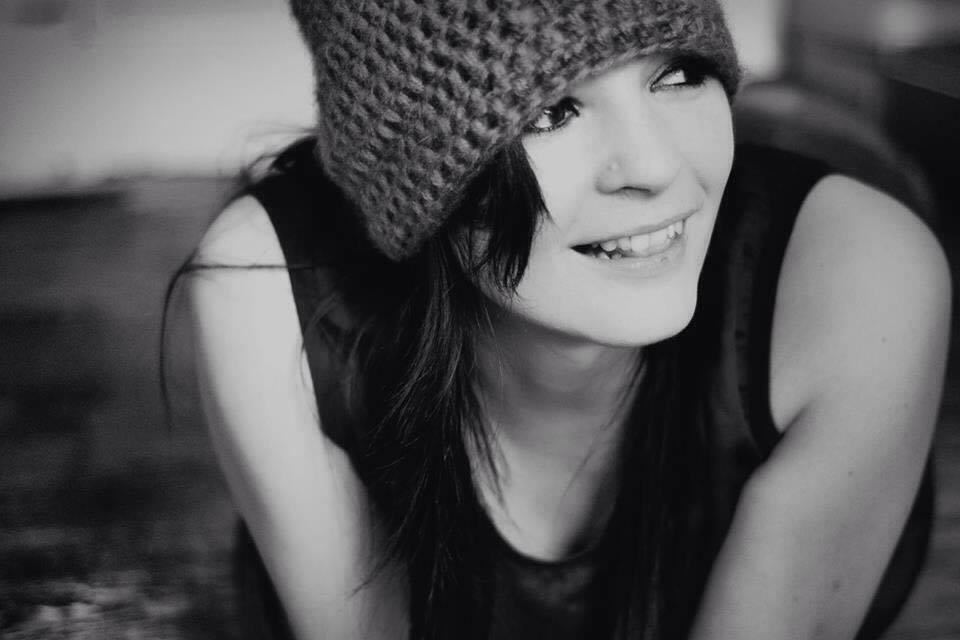 German author Susanne Glanzner